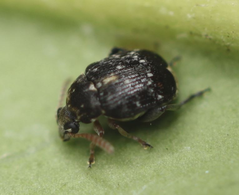 Bruchus luteicornis, Männchen, am 15. Januar 2020